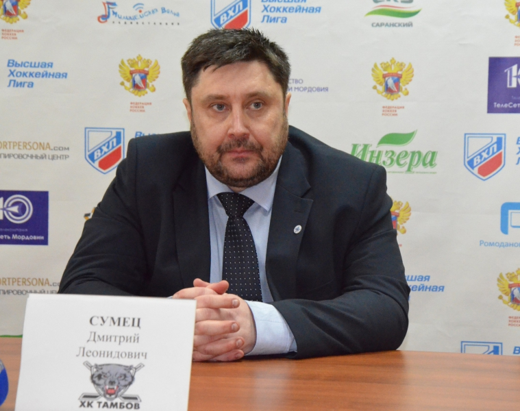 сумец дмитрий леонидович